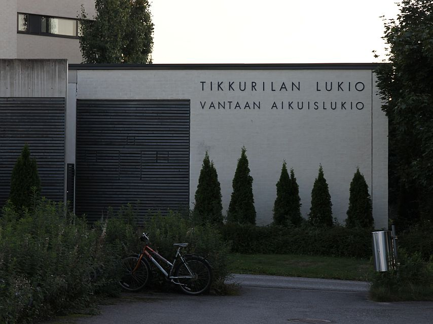 Tikkurilan lukiota Vantaalla. Huom: Muista säilyttää viittaus kuvaajaan, mikäli käytät kuvaa.